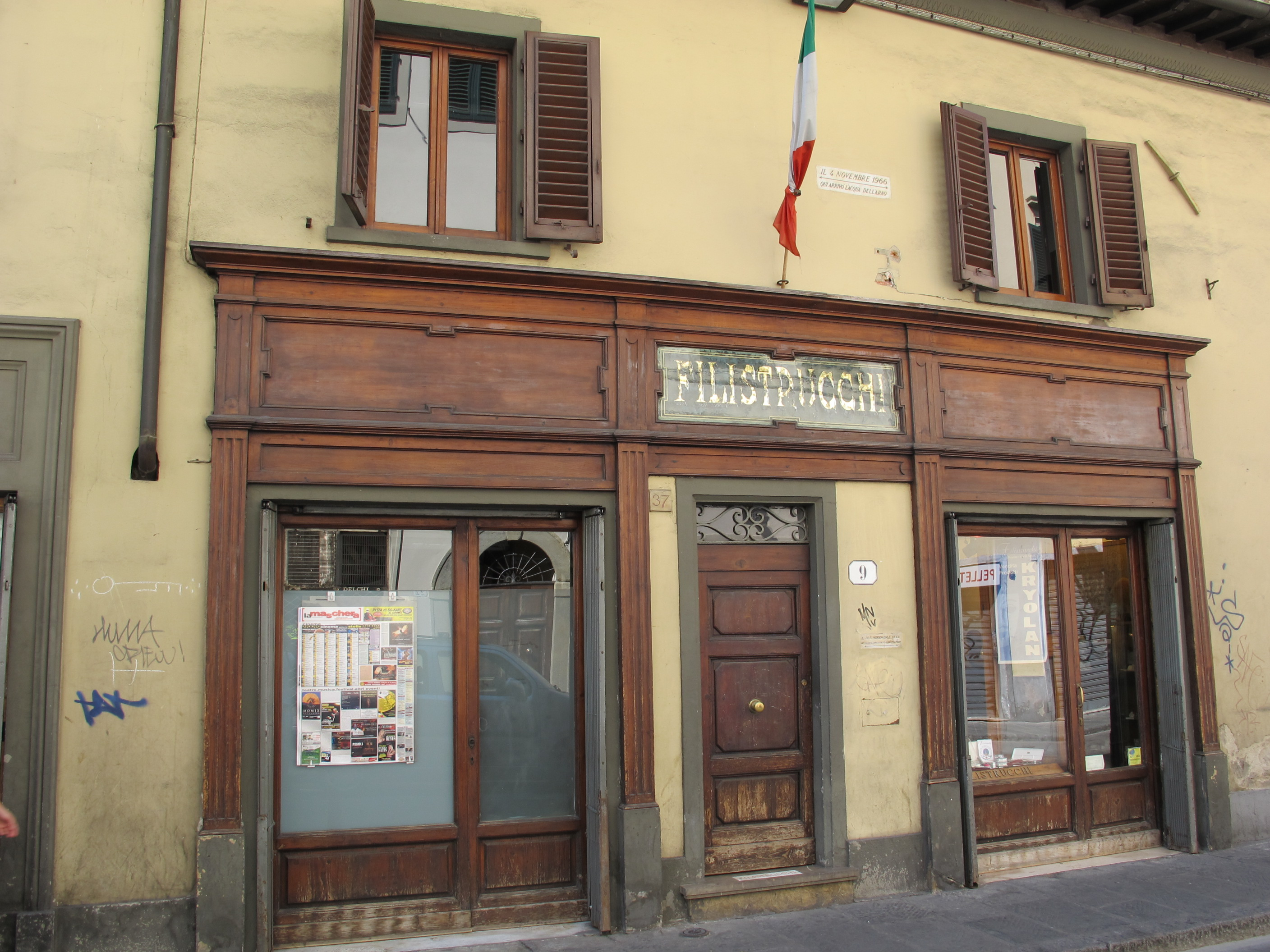 Filistrucchi